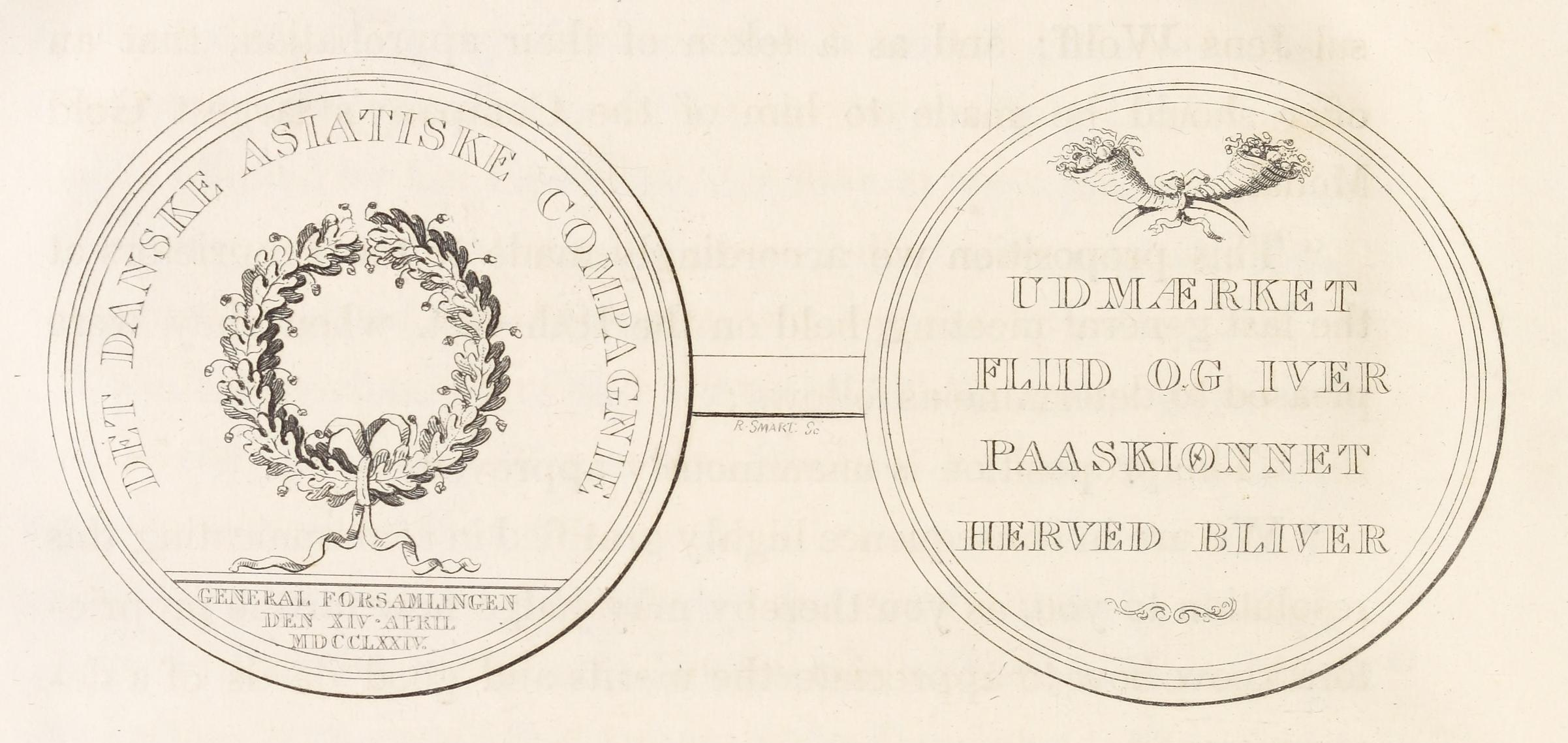 Illustrasjon hentet fra boken "Sketches on a tour to Copenhagen, through Norway and Sweden" av Wolff, Jens og utgitt av Baldwyn and Co. (gb, 1816)